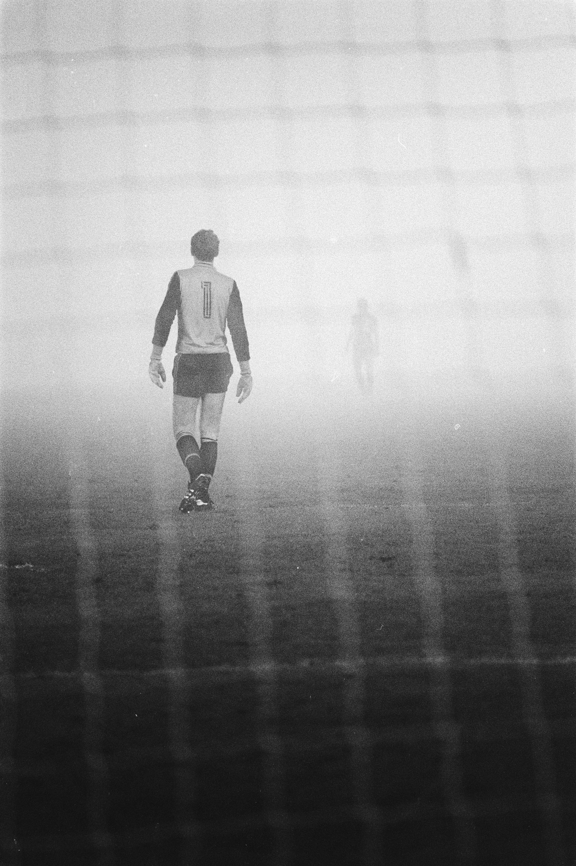 Collectie / Archief : Fotocollectie Anefo Reportage / Serie : FC Twente - Ajax afgelast bij 0-0 stand wegens mist Beschrijving : Twente keeper van Gerven tuurt in de mist Datum : 20 oktober 1979 Locatie : Enschede, Overijssel Trefwoorden : mist, sport, voetbal Persoonsnaam : Gerven, André van Fotograaf : Dijk, Hans van / Anefo Auteursrechthebbende : Nationaal Archief Materiaalsoort : Negatief (zwart/wit) Nummer archiefinventaris : bekijk toegang 2.24.01.05 Bestanddeelnummer : 930-5000